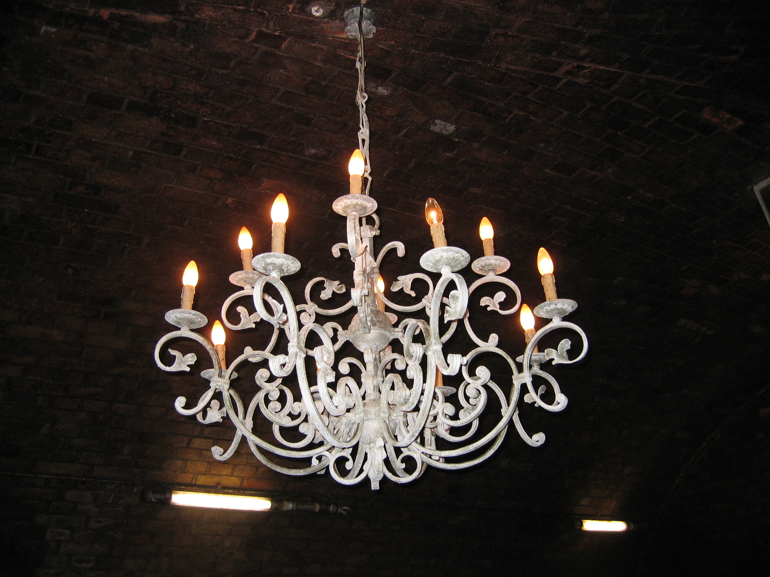 Der denkmalgeschützte Kronleuchtersaal in der Kölner Kanalisation. Der Kronleuchter